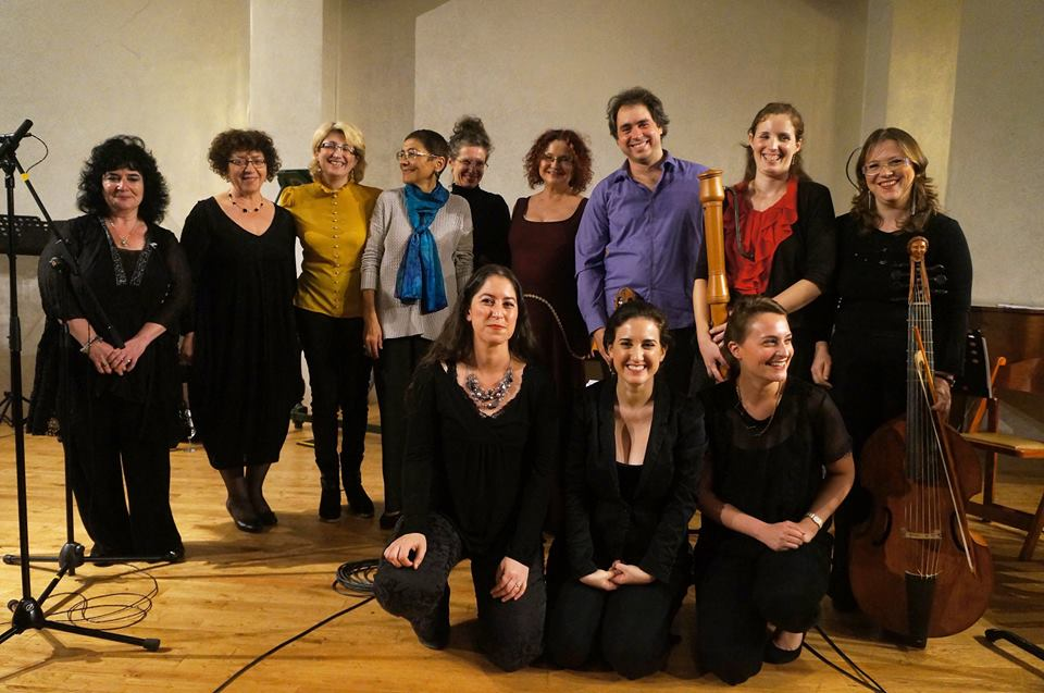 משתתפי סאפפו